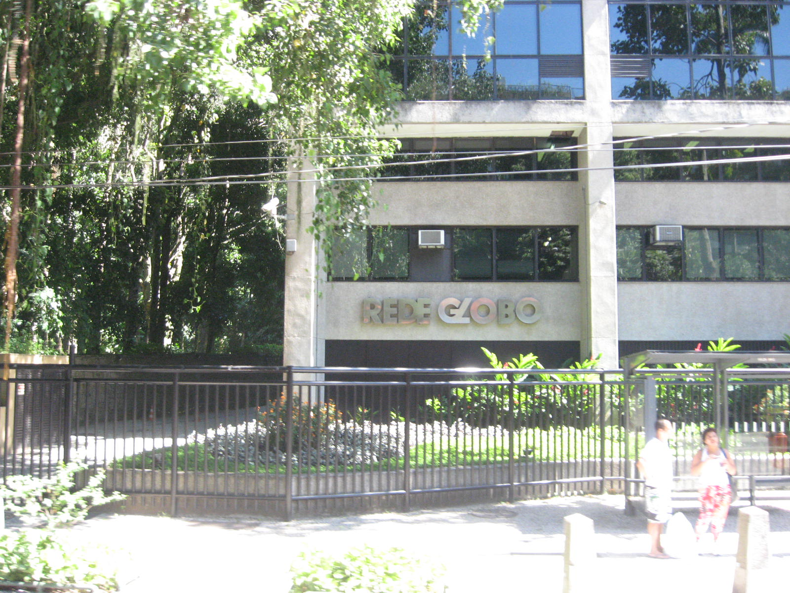 Sede da Rede Globo, no bairro Jardim Botânico, na cidade do Rio de Janeiro.